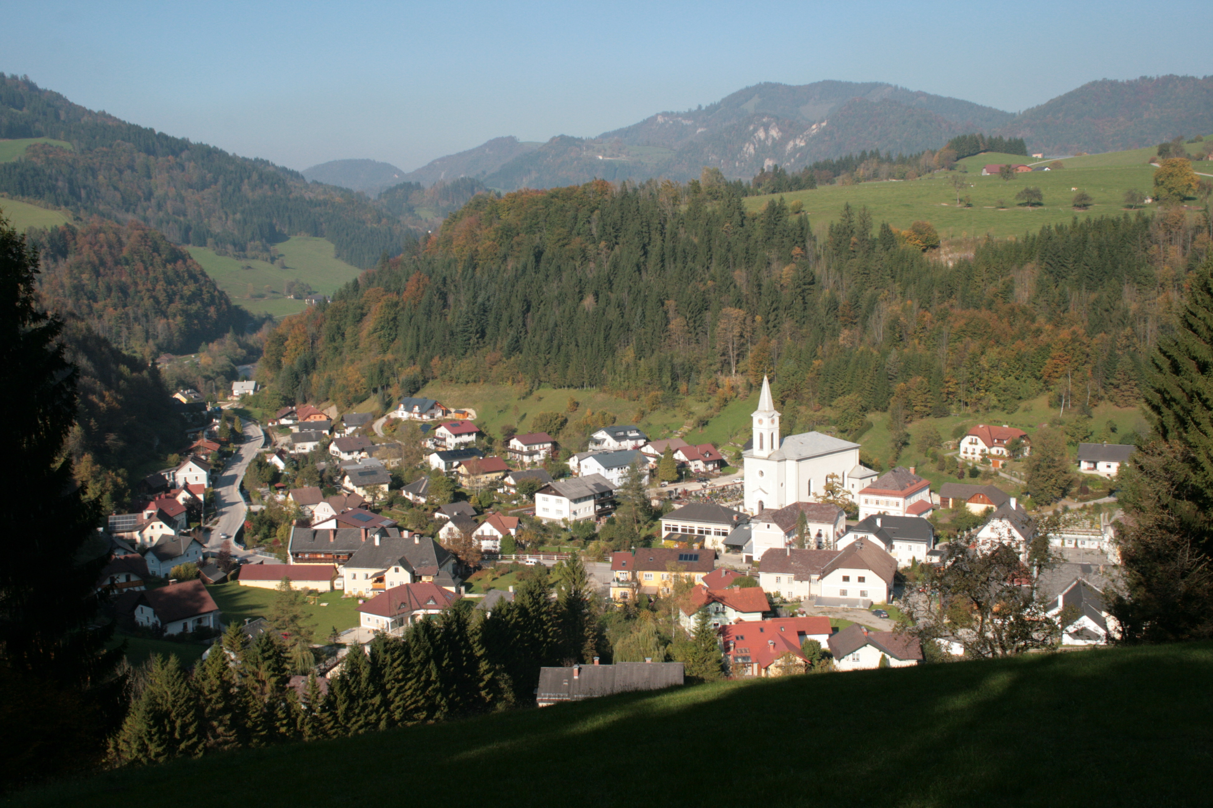 Opponitz, Niederösterreich, Austria